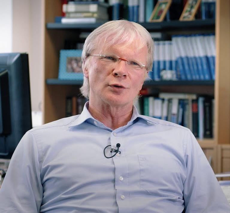 Wieso braucht man eigentlich Energiespeicher? Und welche Rolle kann Wasserstoff bei einer Stromversorgung aus regenerativen Quellen spielen? Um diese Frage dreht sich die wissenschaftliche Arbeit von Ferdi Schüth, Direktor am Max-Planck-Institut für Kohlenforschung in Mülheim an der Ruhr. In diesem Video skizziert er, welche Herausforderung die technologische Innovation bedeutet und was ihn an der Forschung so fasziniert. Weitere Videos aus der "Forschergestalten"-Reihe: Der YouTube-Kanal des Stifterverbandes: Die Zukunftsmacher und ihre Visionen für Bildung und Ausbildung, Forschung und Technik Ein Film von Damian W. Gorczany und Stoyan Radoslavov Motion Grafik: Johannes LDC Guerreiro Musik: Lubomir Brashnenkov